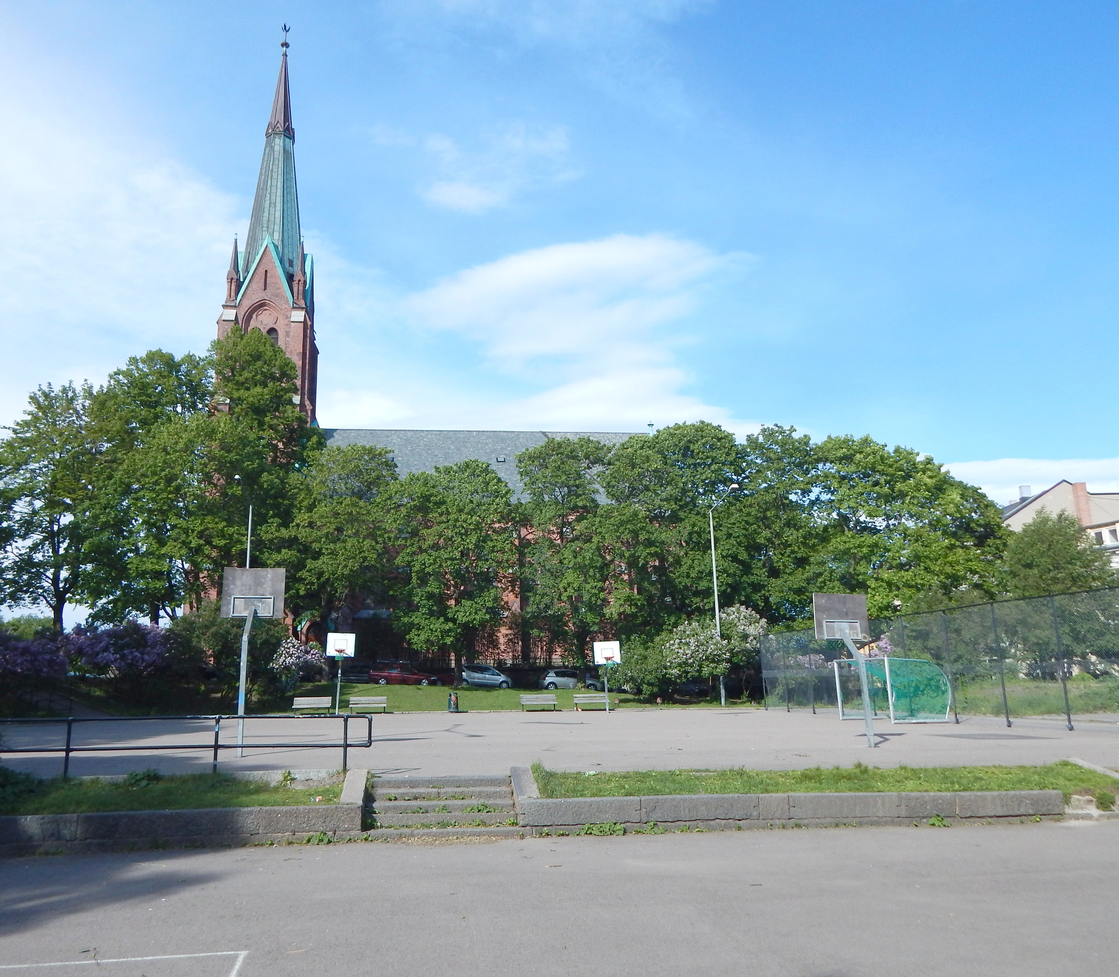 Nordahl Rolfsens plass